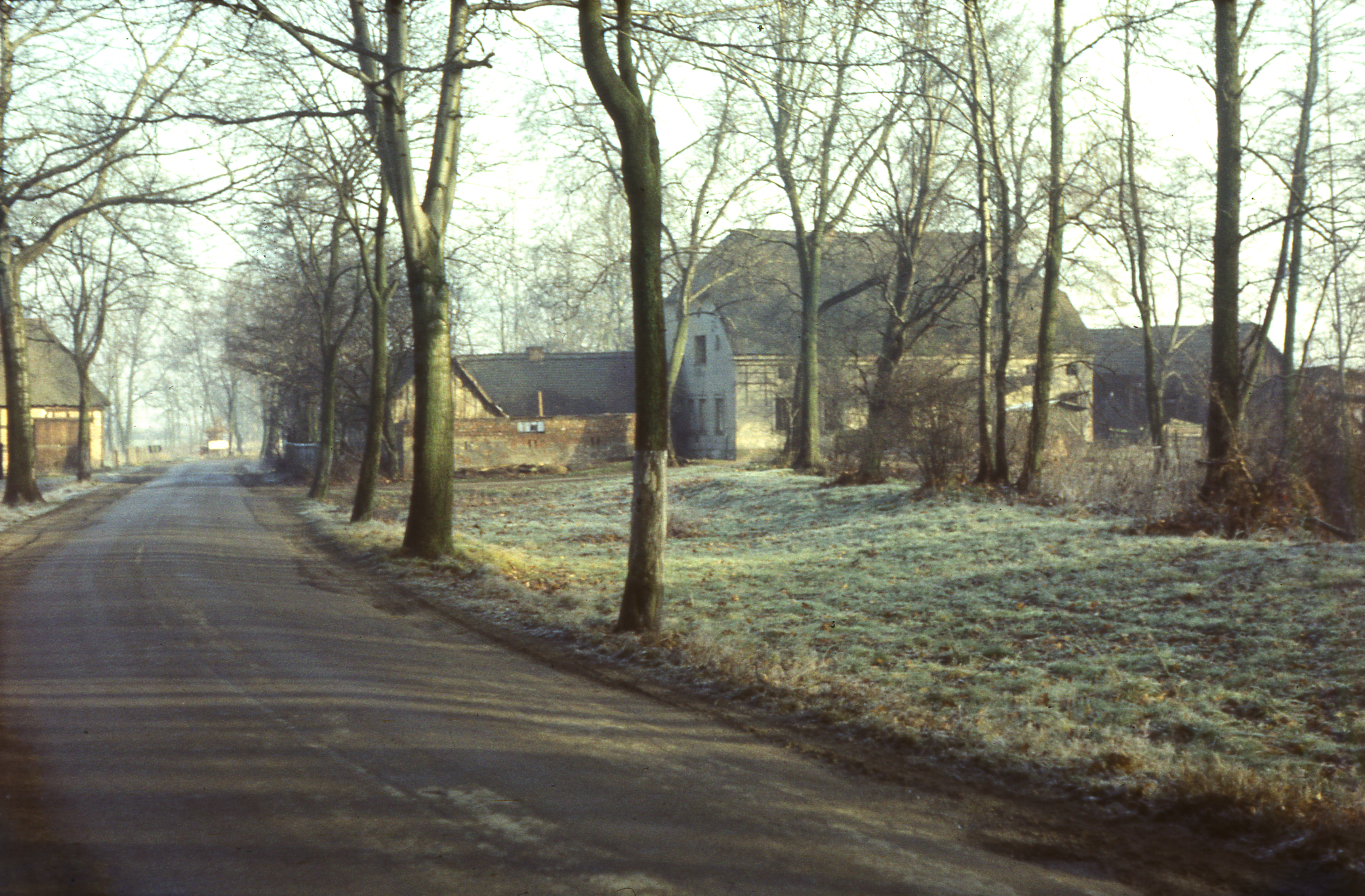 Pielenz-Mühle im ehemaligem Dorf Gliechow 1977.